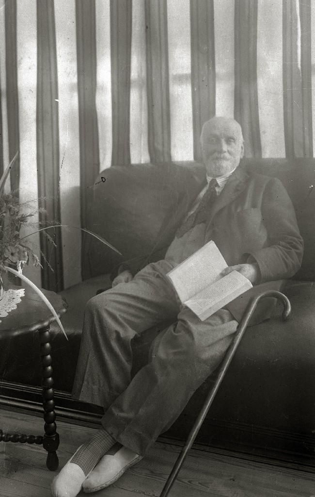 Título original: El novelista Armando Palacio Valdés (17/18) Localización: Guipúzcoa